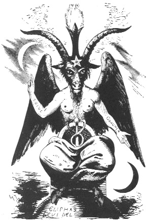 Grabado que muestra un Bafomet. Se encuentra en el libro "Ritual de Alta Magia", escrito por Eliphas Levi en 1856.